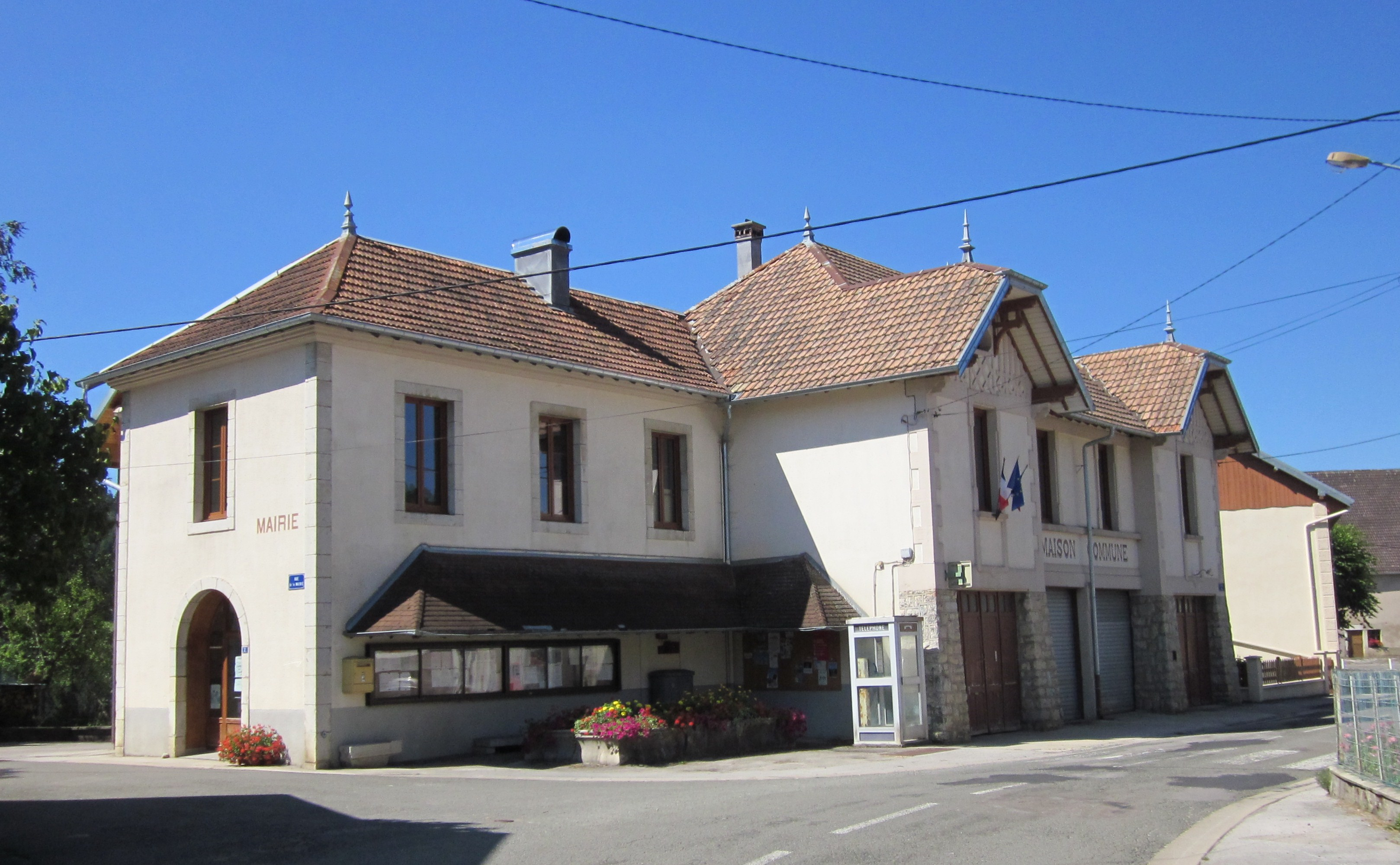 Vanclans (Doubs) - mairie et maison commune